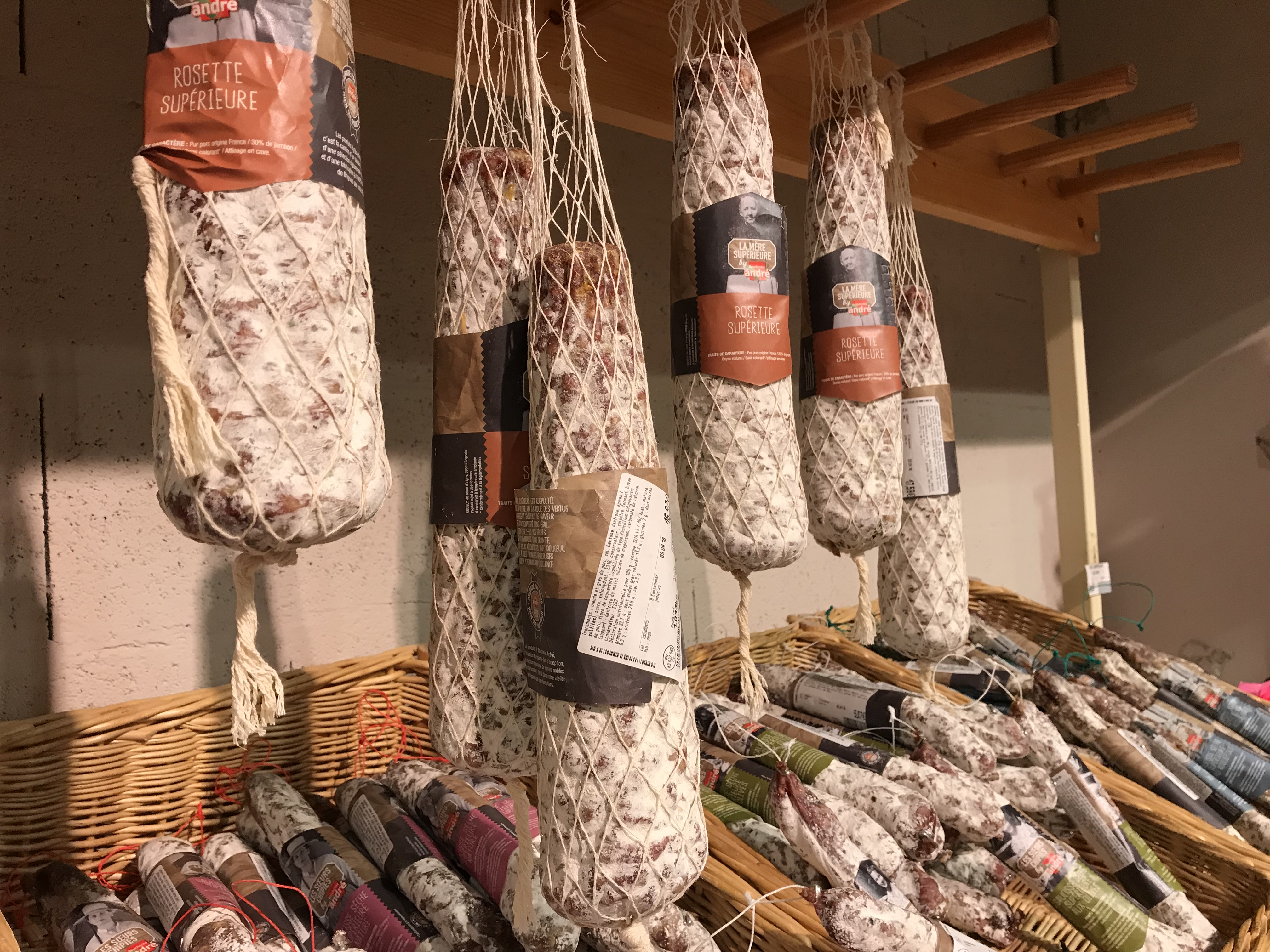 Rosettes à Boucheries André (Rillieux-la-Pape).